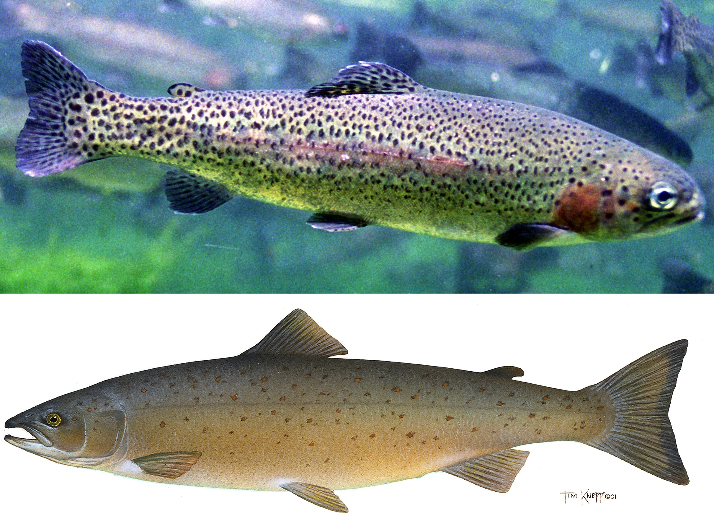 虹鳟（Oncorhynchus mykiss）和大西洋鲑（Salmo salar）